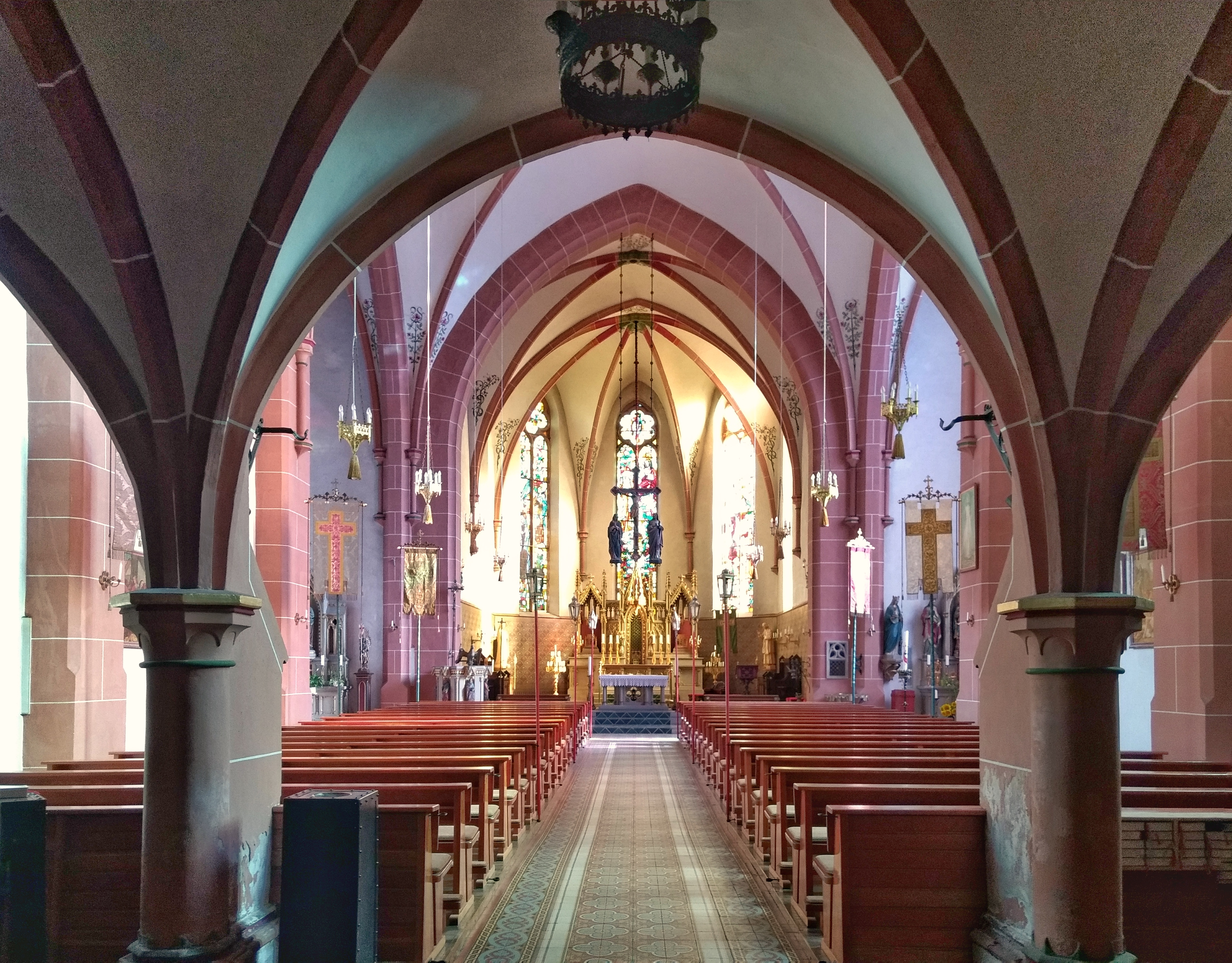 St. Rufus Niedaltdorf